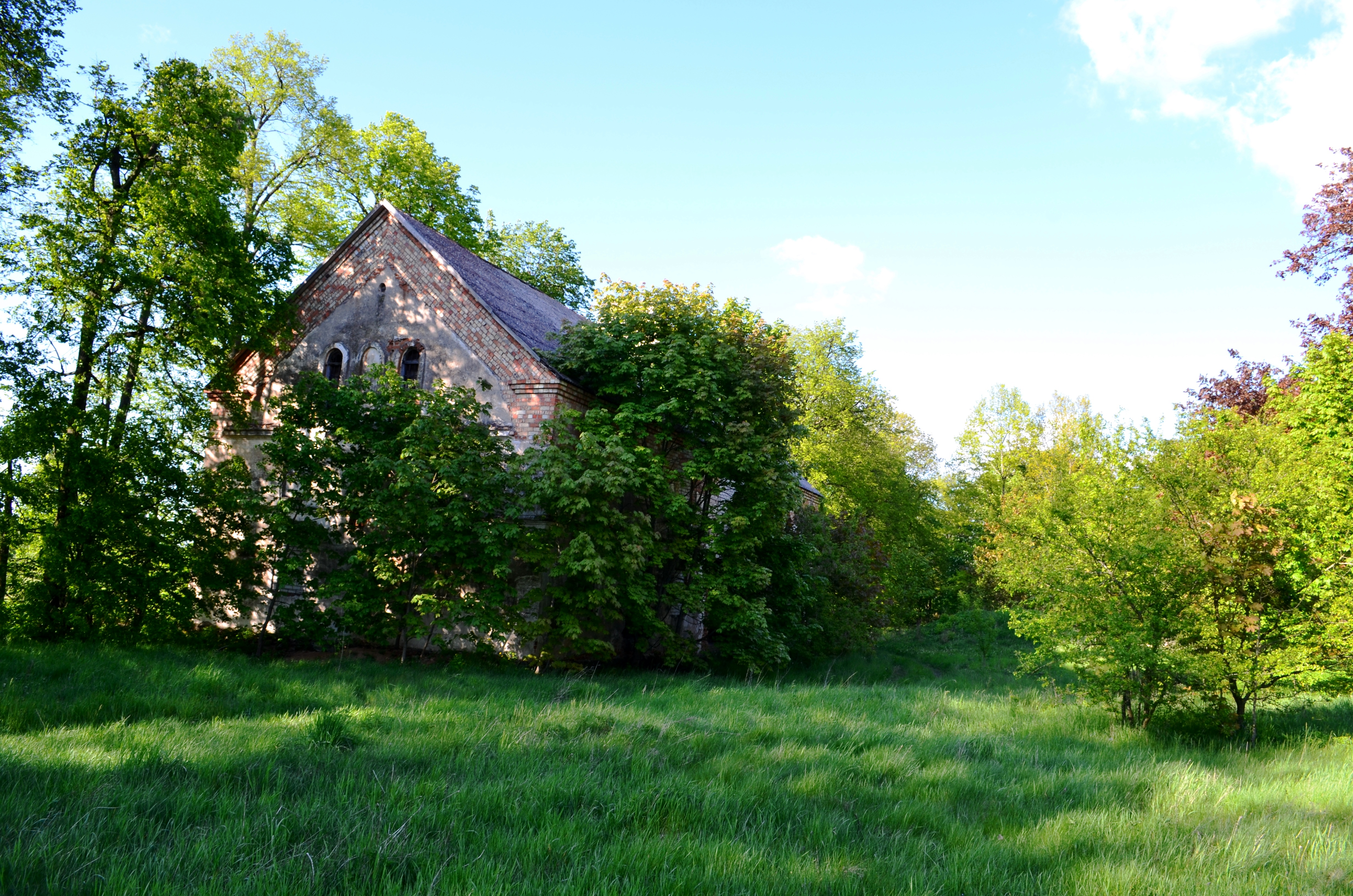 Zabieliškio dvaro liekanos, Kėdainių raj.